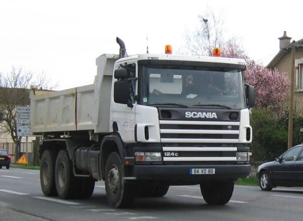 Camion porteur Scania équipée d'une benne travaux publics. - Licence GFDL. Auteur : Olivier MEYER Olivier Meyer